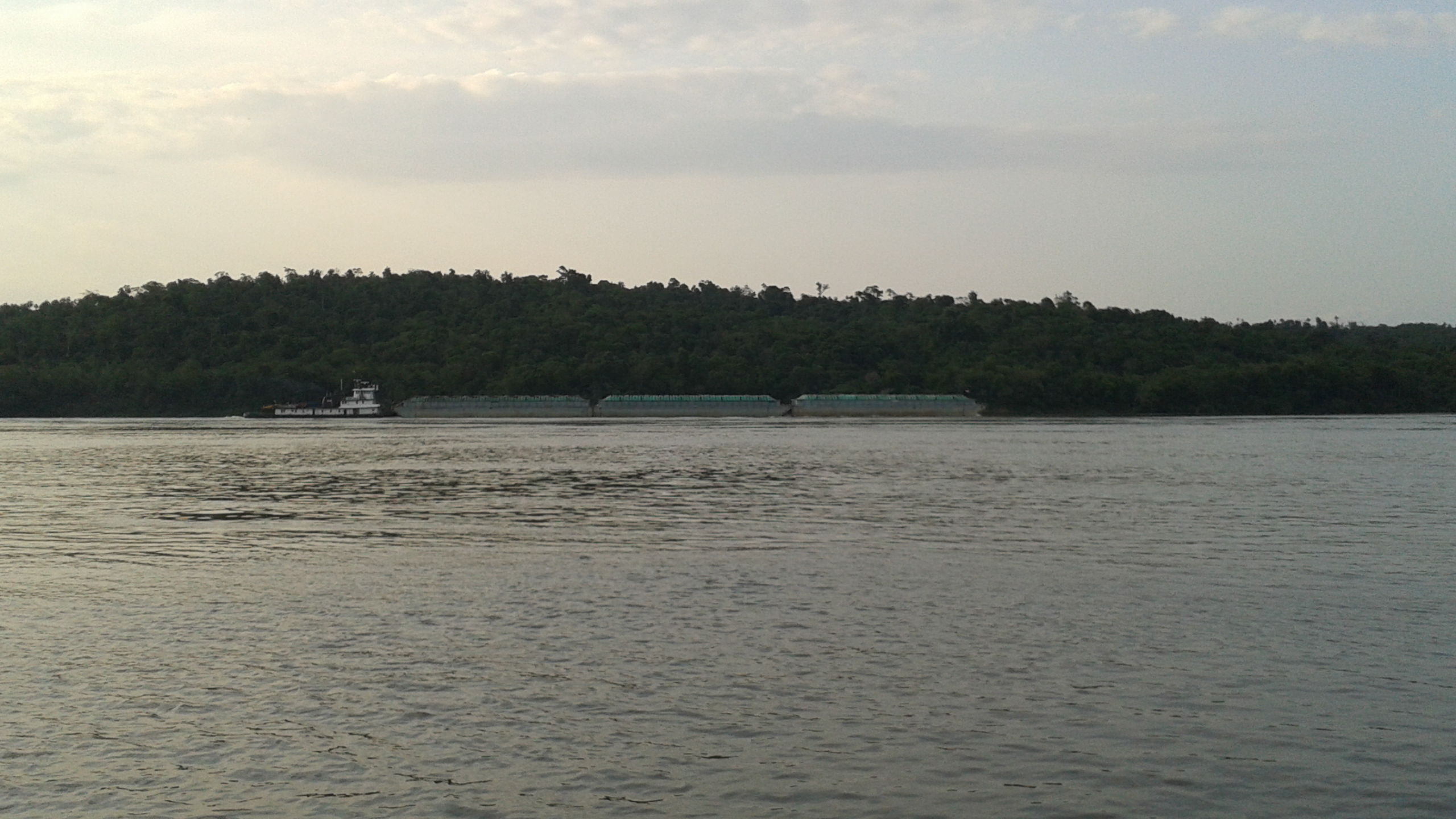 Barcaza sobre el Río Paraná en Puerto Mineral. De fondo, República del Paraguay. Fuente: Periodista Horacio Cambeiro.